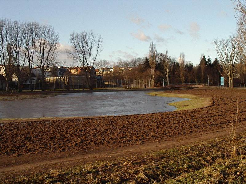 Beschreibung Fürth, Pegnitz (Fluss), eine 2003 neu angelegte Flußschleife, von NO (2004-01-16) Fotograph: keichwa. Quelle Fotographie 2003-11-08 Fotograph --Keichwa Copyright Status GNU Freie Dokumentationslizenz Leicht erhöhter Wasserspiegel. Im Hintergrund die neue Brücke.